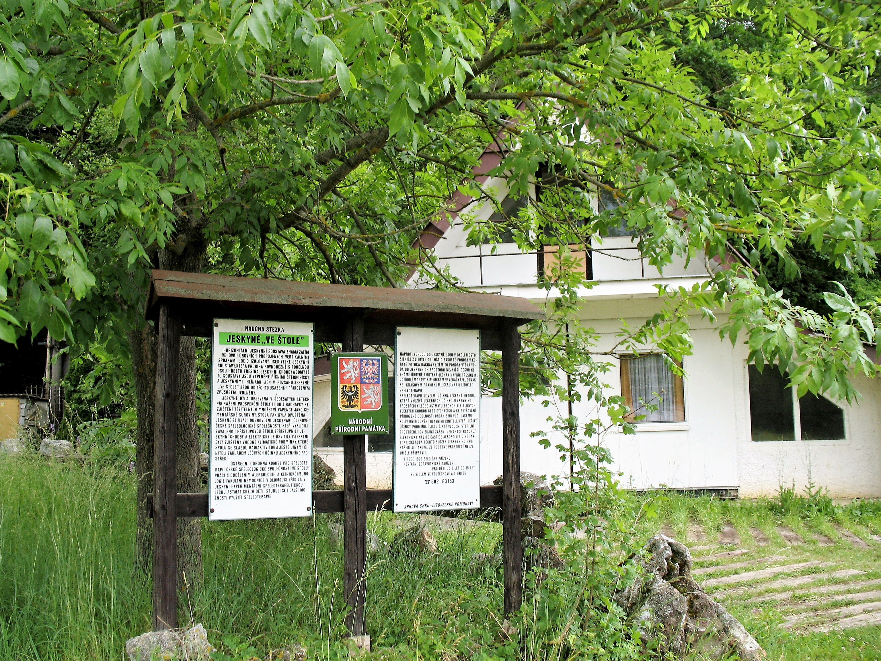 Jeskyně Ve štole na jižním úpatí Třesína (katastrální území Měník, PP Třesín)